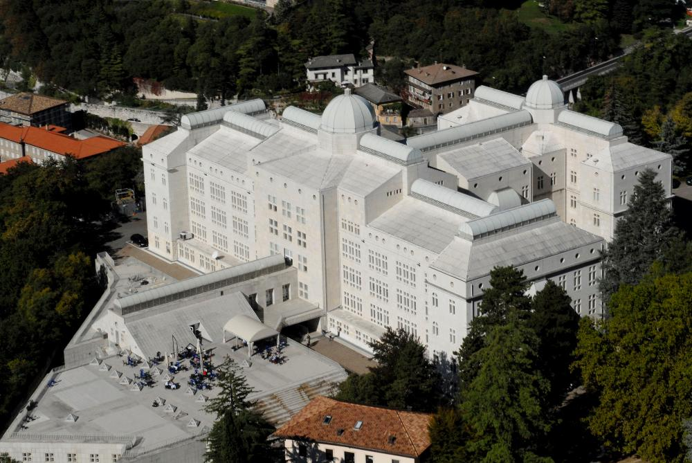 Trento大学